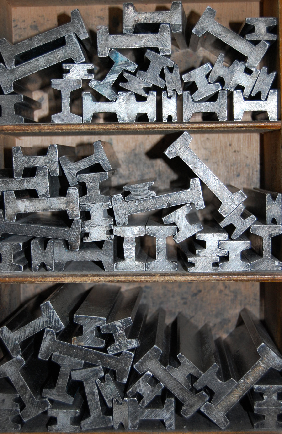 Peces que utilitza la Minerva per fixar els números